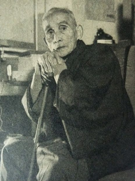 香取秀真